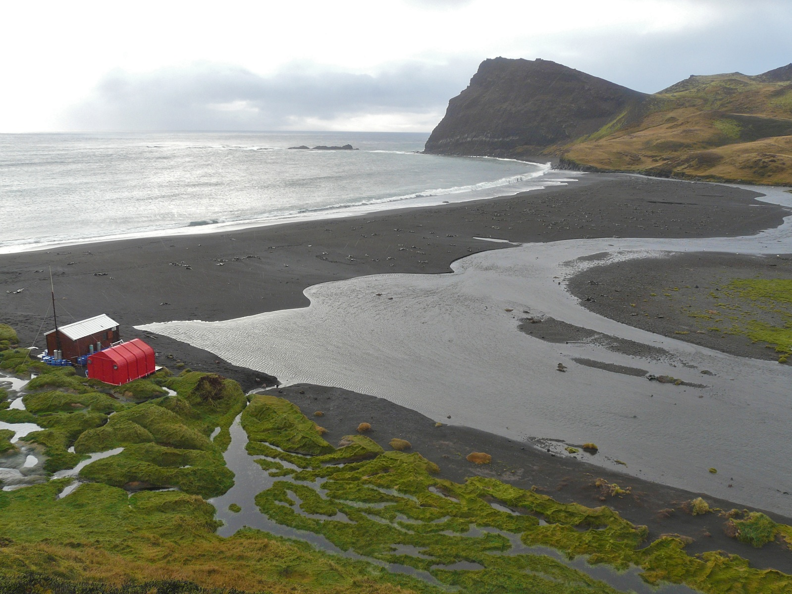 Baie Américaine, vue générale